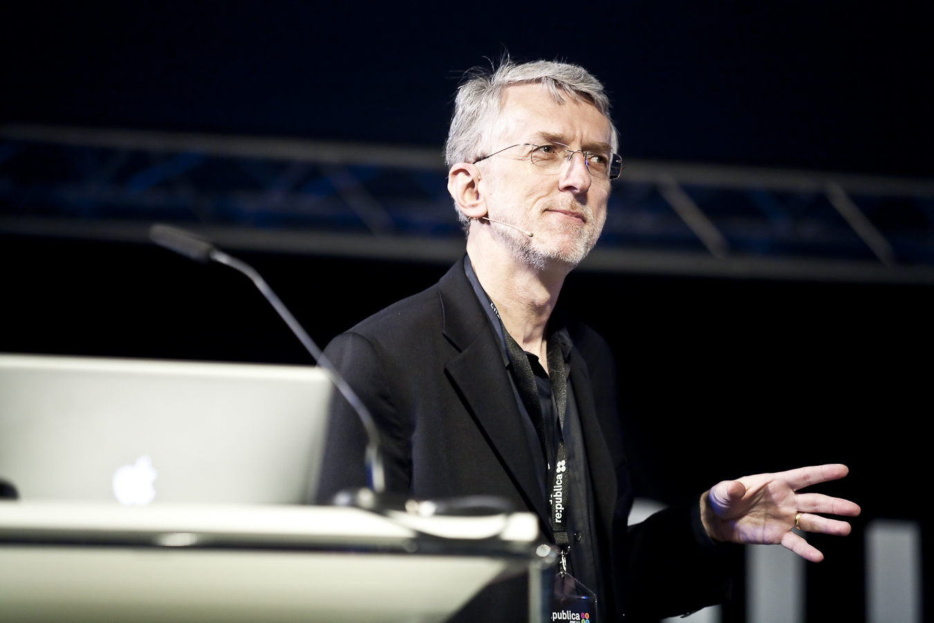 Jeff Jarvis bei seinem Vortrag über "The German Privacy Paradox" auf der re:publica10. Photo by Daniel Seiffert